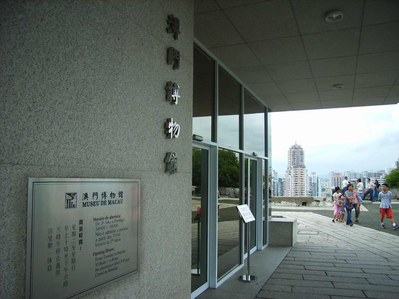 澳門大炮台公園中心的"澳門博物館" Macau Museum